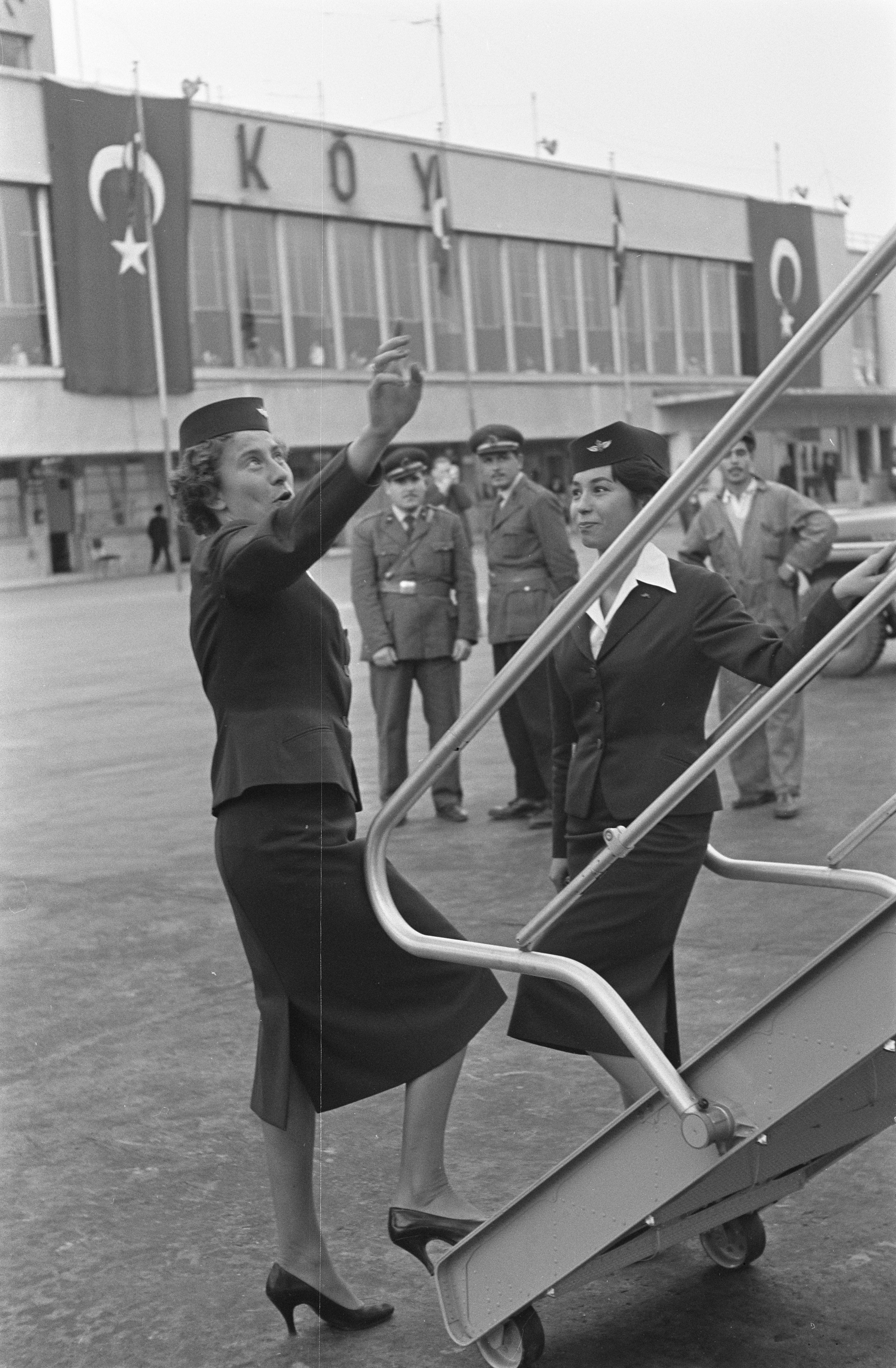 Collectie / Archief : Fotocollectie Anefo Reportage / Serie : [ onbekend ] Beschrijving : Vraagteken vlucht Lockheed Electra naar Istanbul Datum : 29 oktober 1959 Locatie : Istanboel Trefwoorden : steden Instellingsnaam : Lockheed Electra Fotograaf : Pot, Harry / Anefo Auteursrechthebbende : Nationaal Archief Materiaalsoort : Negatief (zwart/wit) Nummer archiefinventaris : bekijk toegang 2.24.01.05 Bestanddeelnummer : 910-7819